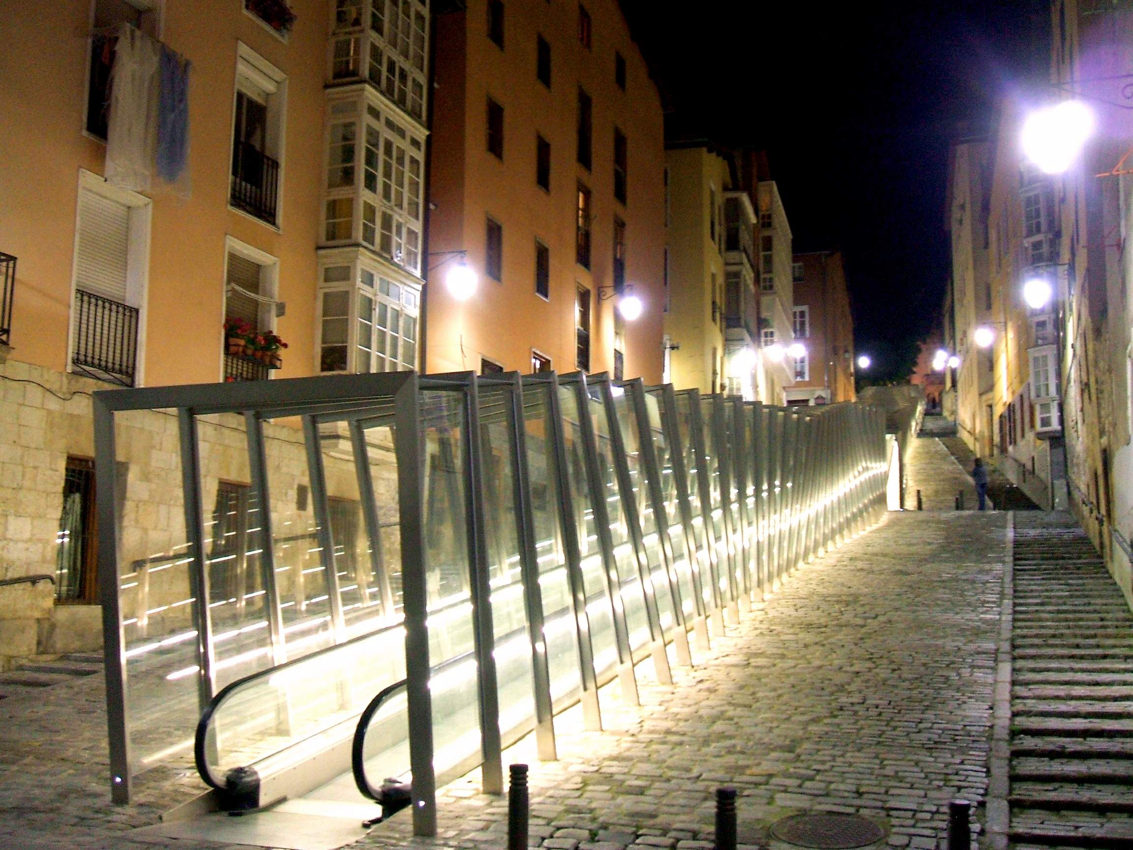 Rampa mecánica del cantón de la Soledad, Vitoria-Gasteiz